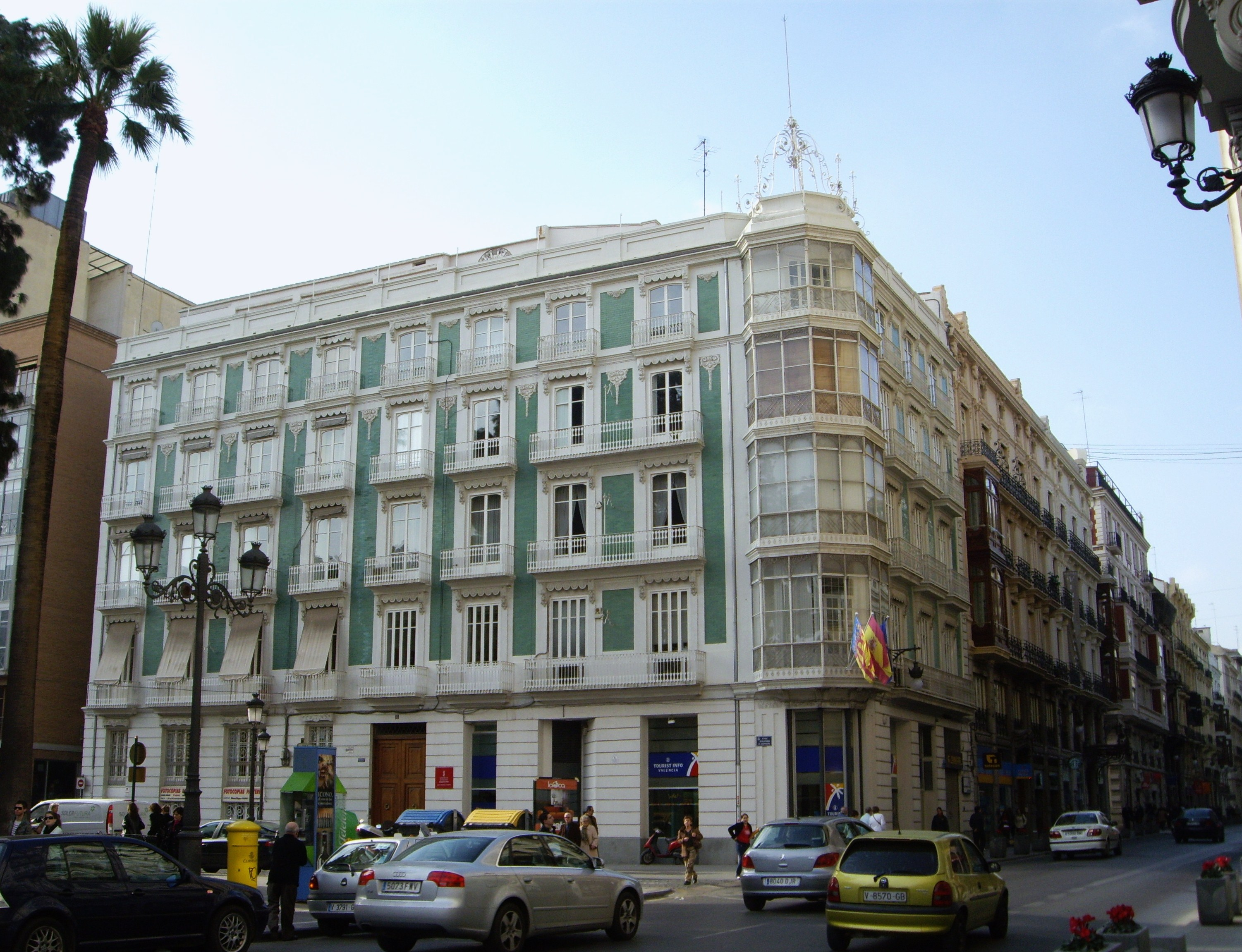 Edifici Bolinches de València, a l'inici del carrer de la Pau.